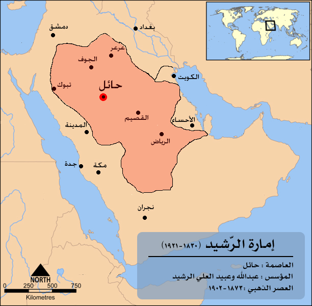 إمارة آل رشيد في أقصى اتساع لها